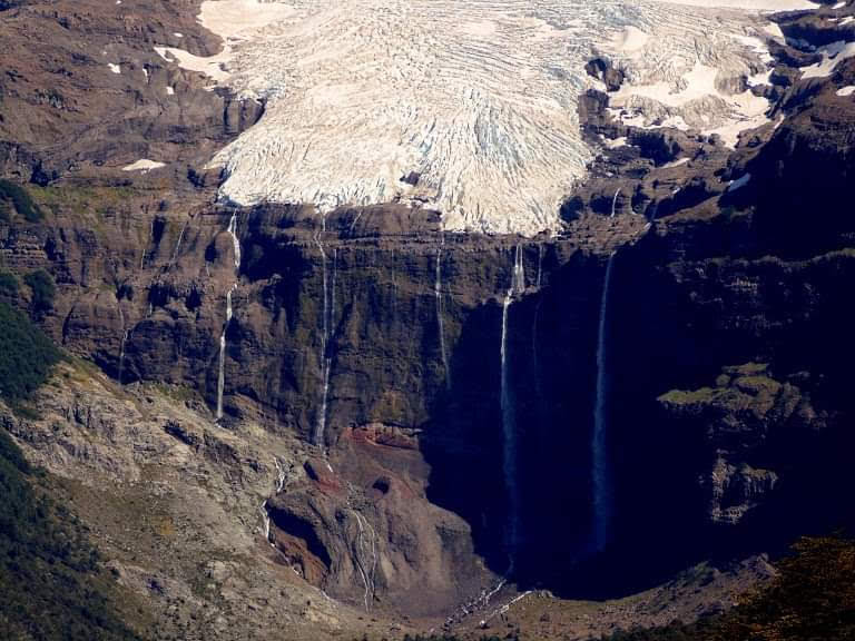 Foto al glaciar castaño Overo tomada desde el sendero de trekking que sube a Laguna Ilón con cámara Sony dsc h200, haciendo uso del Zoom.